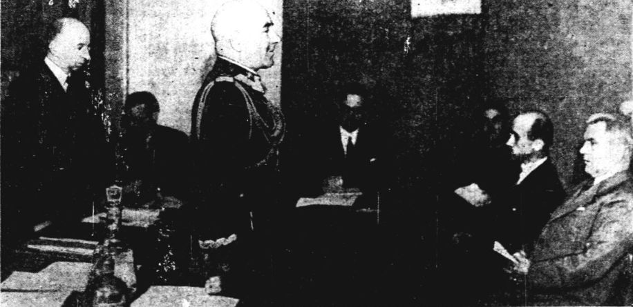 Marszałek Edward Rydz-Śmigły przemawia do zebranych delegatów na walnym zjeździe Związku Legionistów. Za stołem prezydialnym stoi naczelny komendant Związku Legionistów, płk Adam Koc. W pierwszym rzędzie siedzą: wicemarszałek Sejmu Tadeusz Schaetzel i minister Juliusz Ulrych.